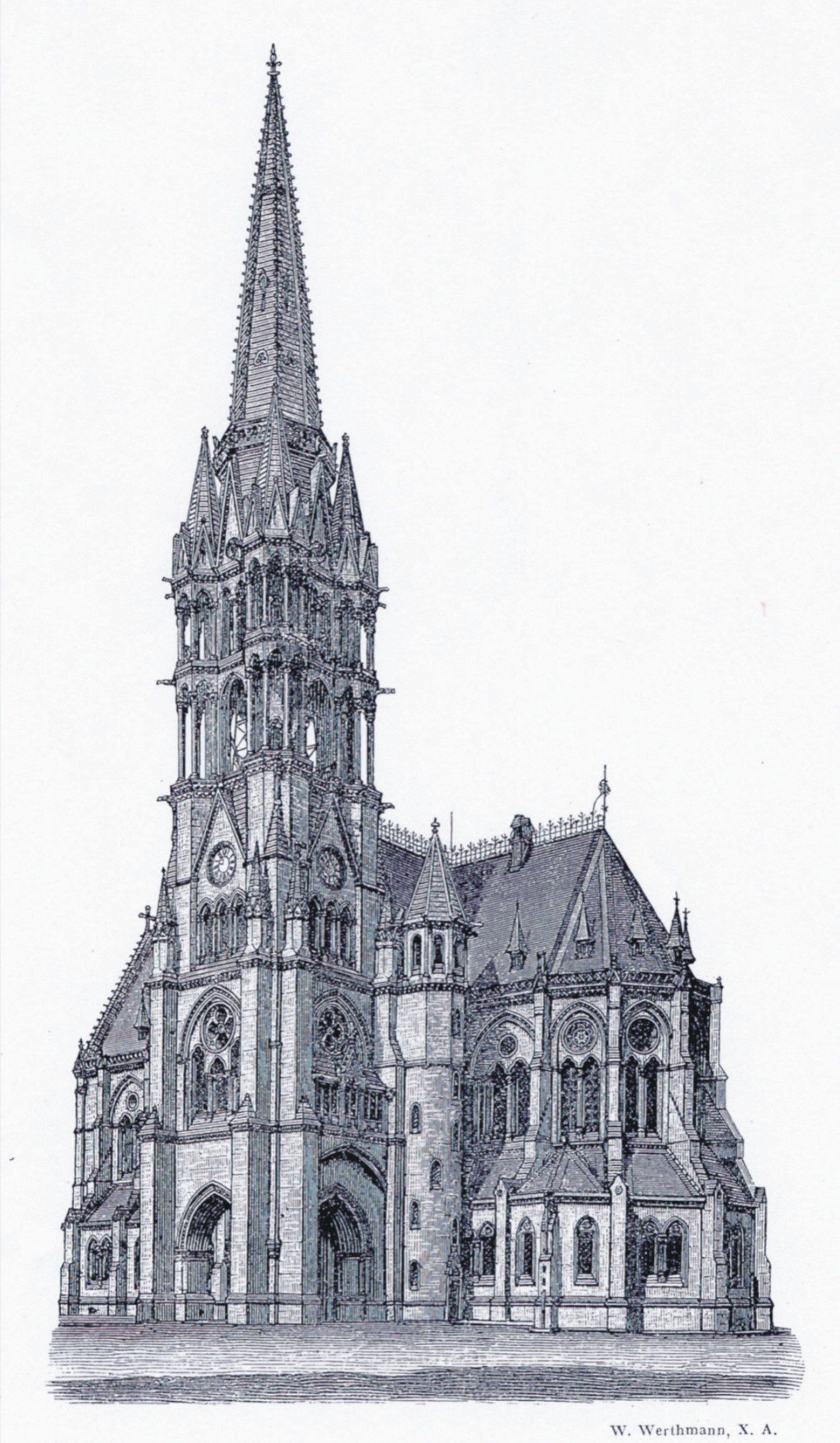 Johanneskirche in Dresden (Sachsen, Deutschland), Xylographie, W. Werthmann